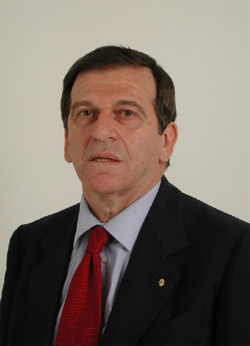 SIndacalista e politico italiano